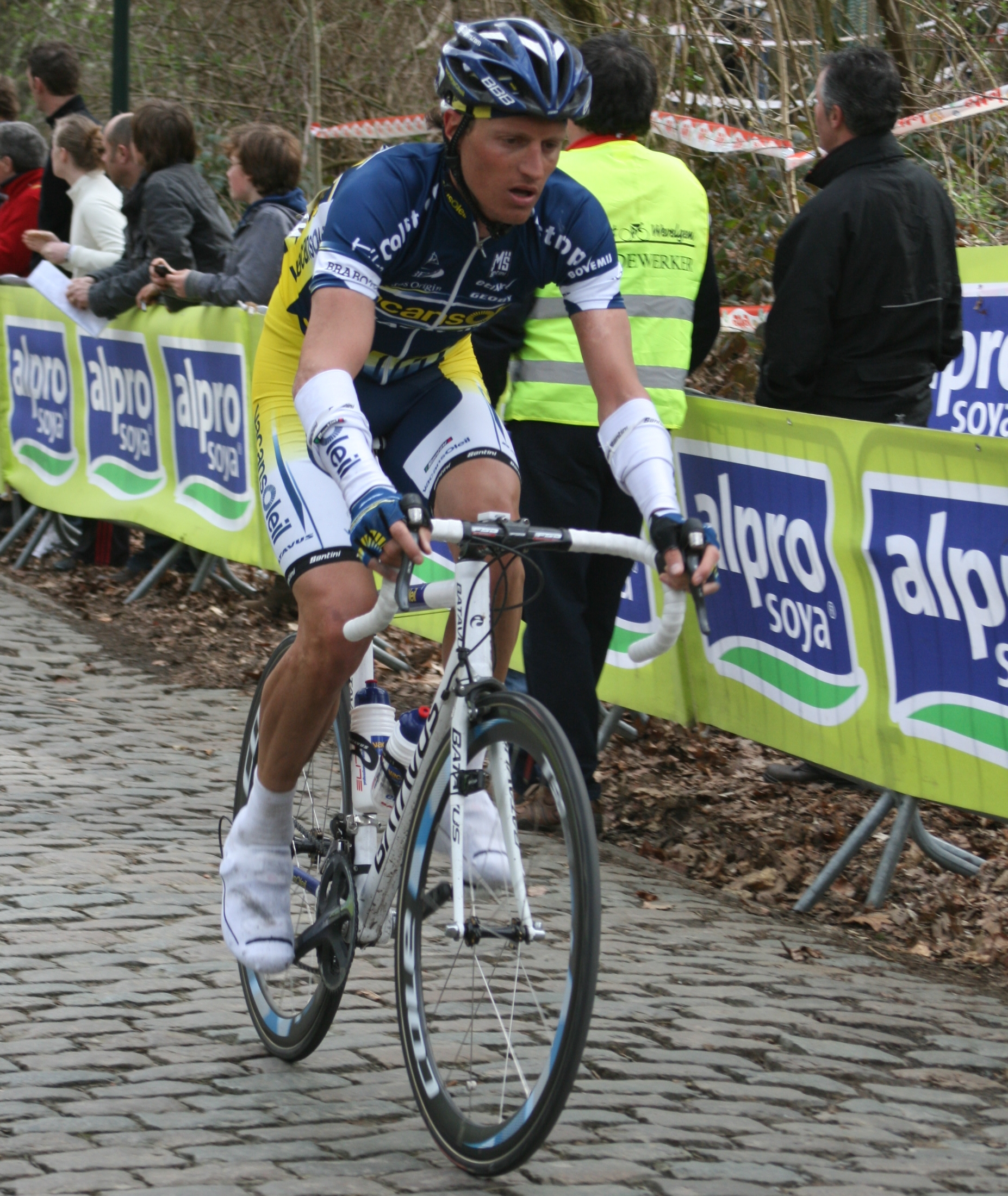 Alberto Ongarato dans la deuxième ascension du mont Kemmel lors de Gand-Wevelgem 2010